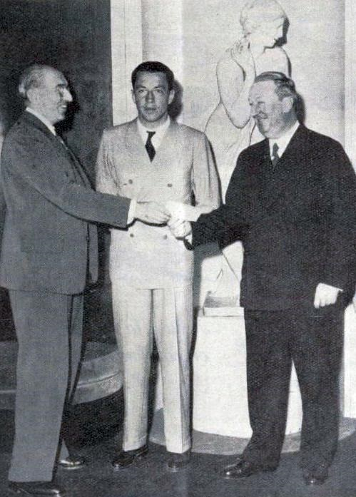 Siège de l'ACF, avril 1937, Mrs Pérouse , trésorier, Jean-Pierre Wimille et Ettore Bugatti (prime de 400000 francs pour fonds de course).